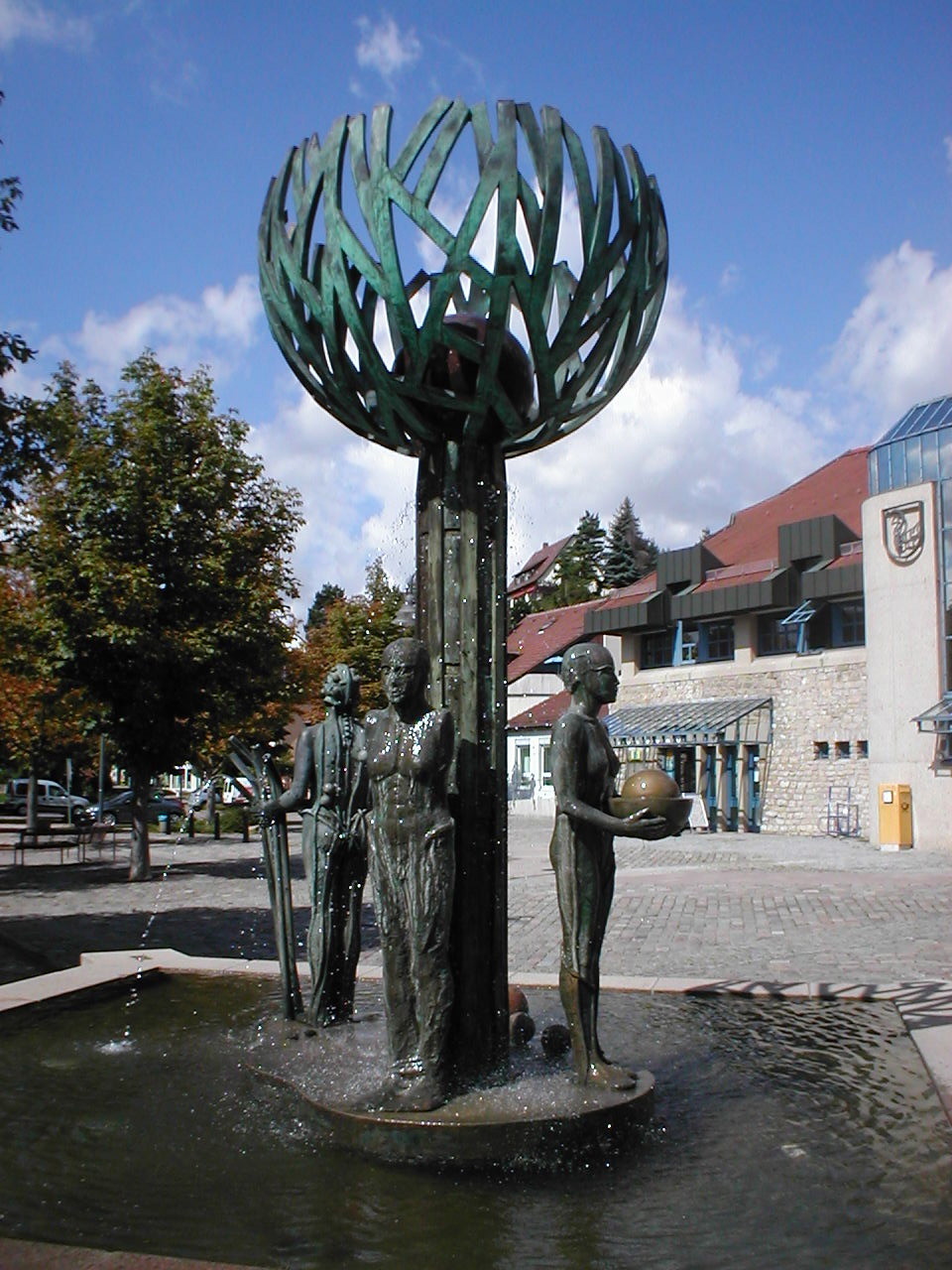 Jahreszeitenbrunnen auf dem Rathausplatz in Talheim, entworfen 1991 von Ursula Stock